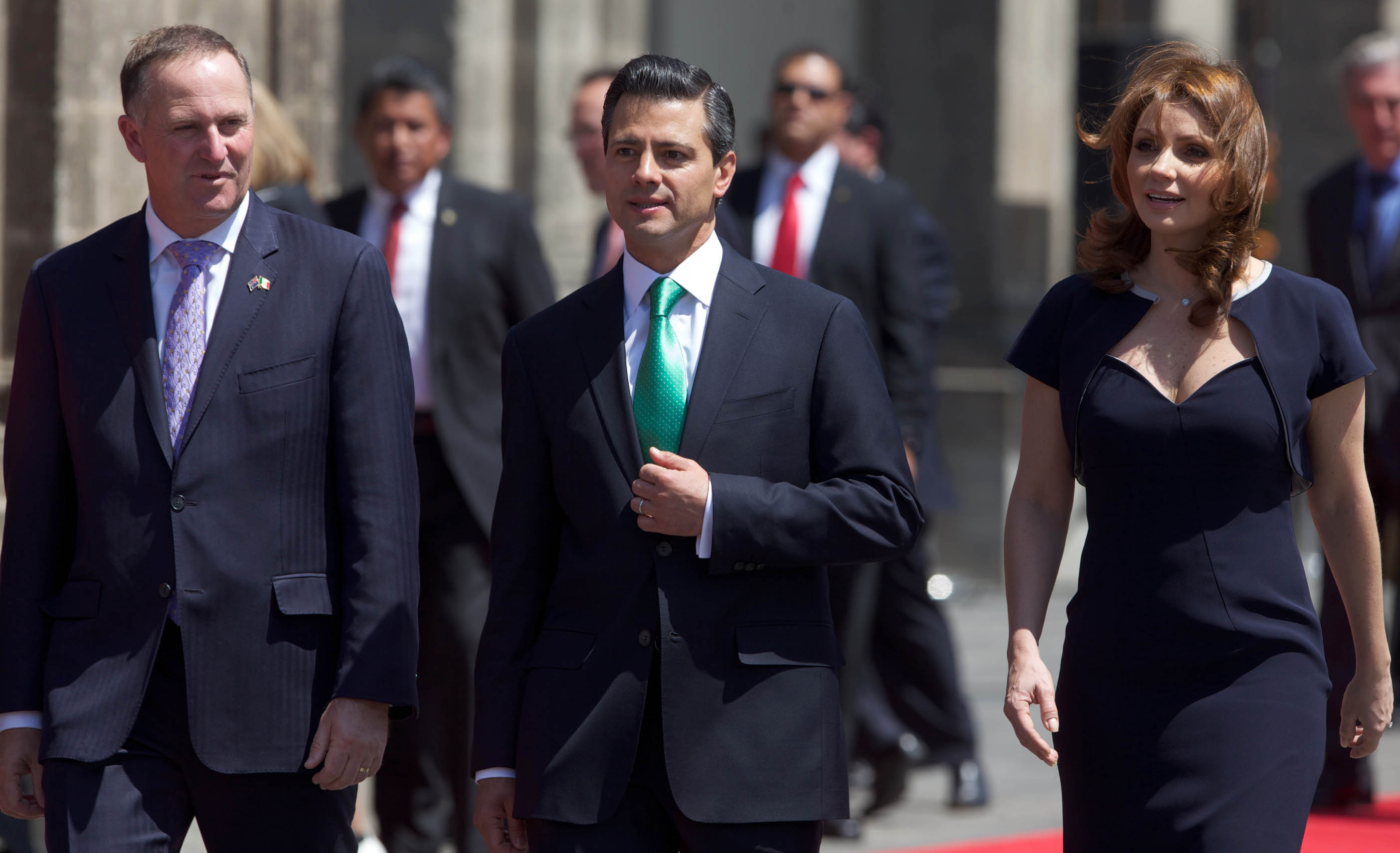 Visita oficial del excelentísimo señor John Key, Primer Ministro de Nueva Zelandia. Castillo de Chapultepec. 5 marzo 2013